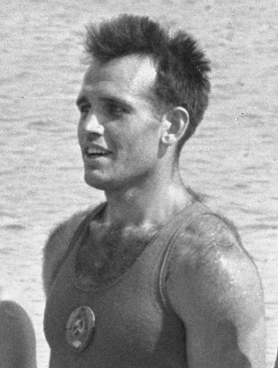 Europese roeikampioenschappen Bosbaan, 6 vier met Rusland